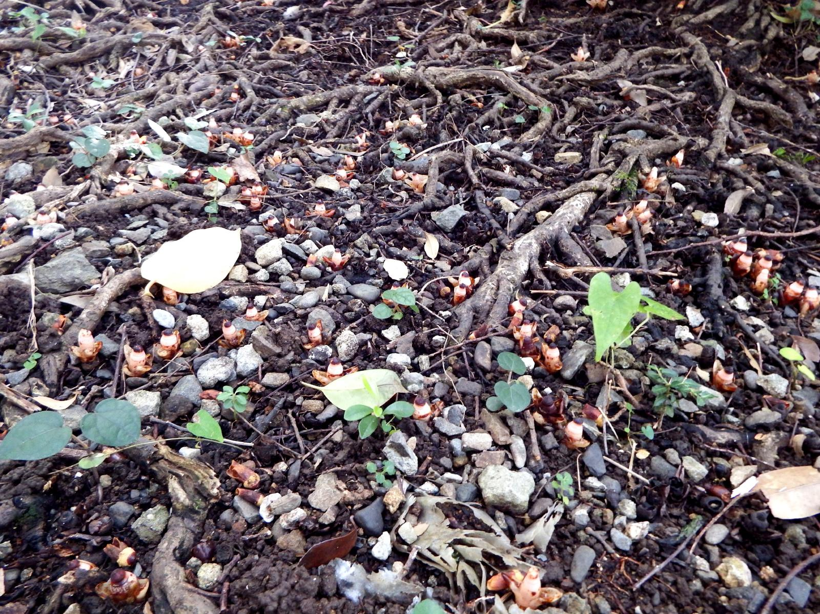 最御崎寺のヤッコソウ